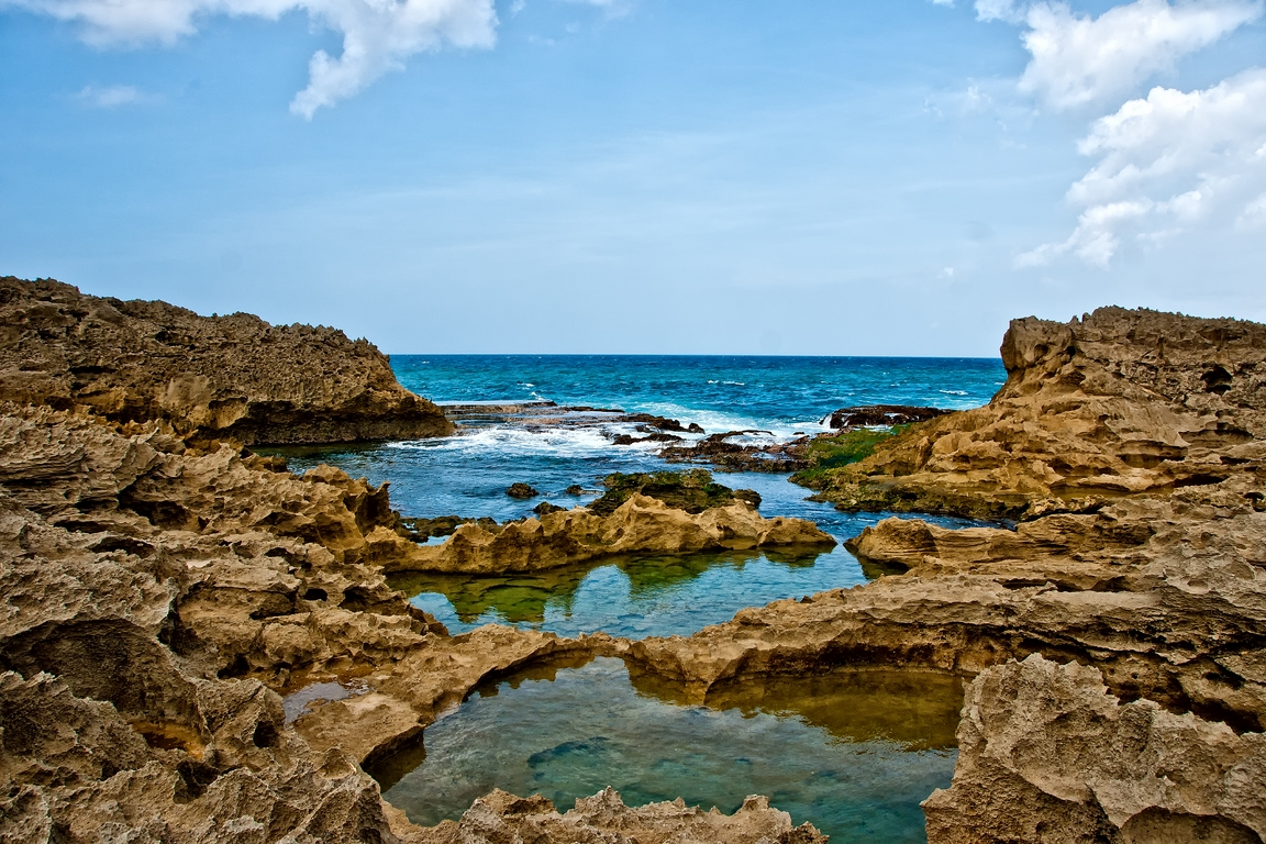 Puerto Rico Mar bella Puerto Nuevo